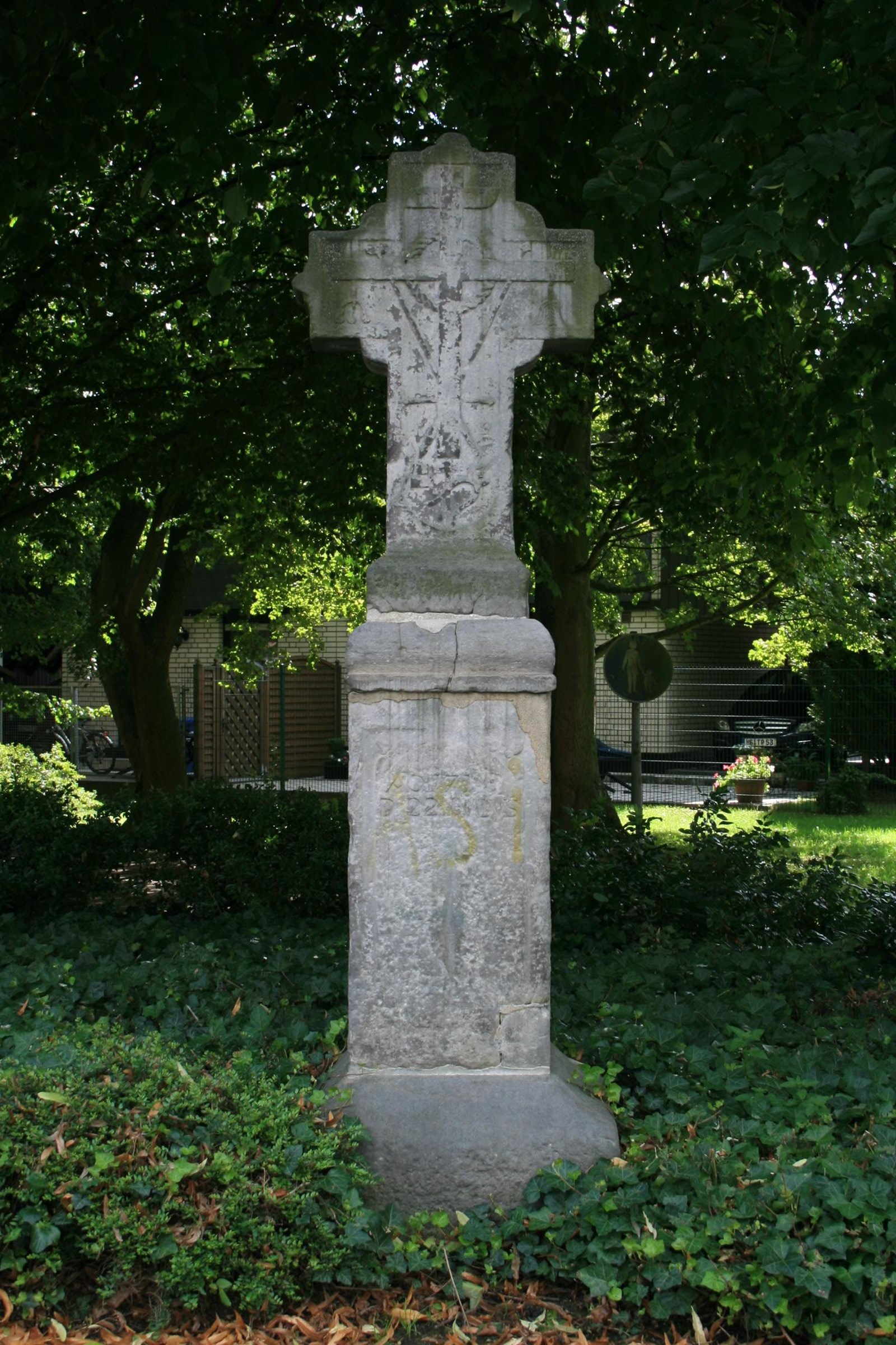 Wegekreuz Altenbroicher Straße Mönchengladbach